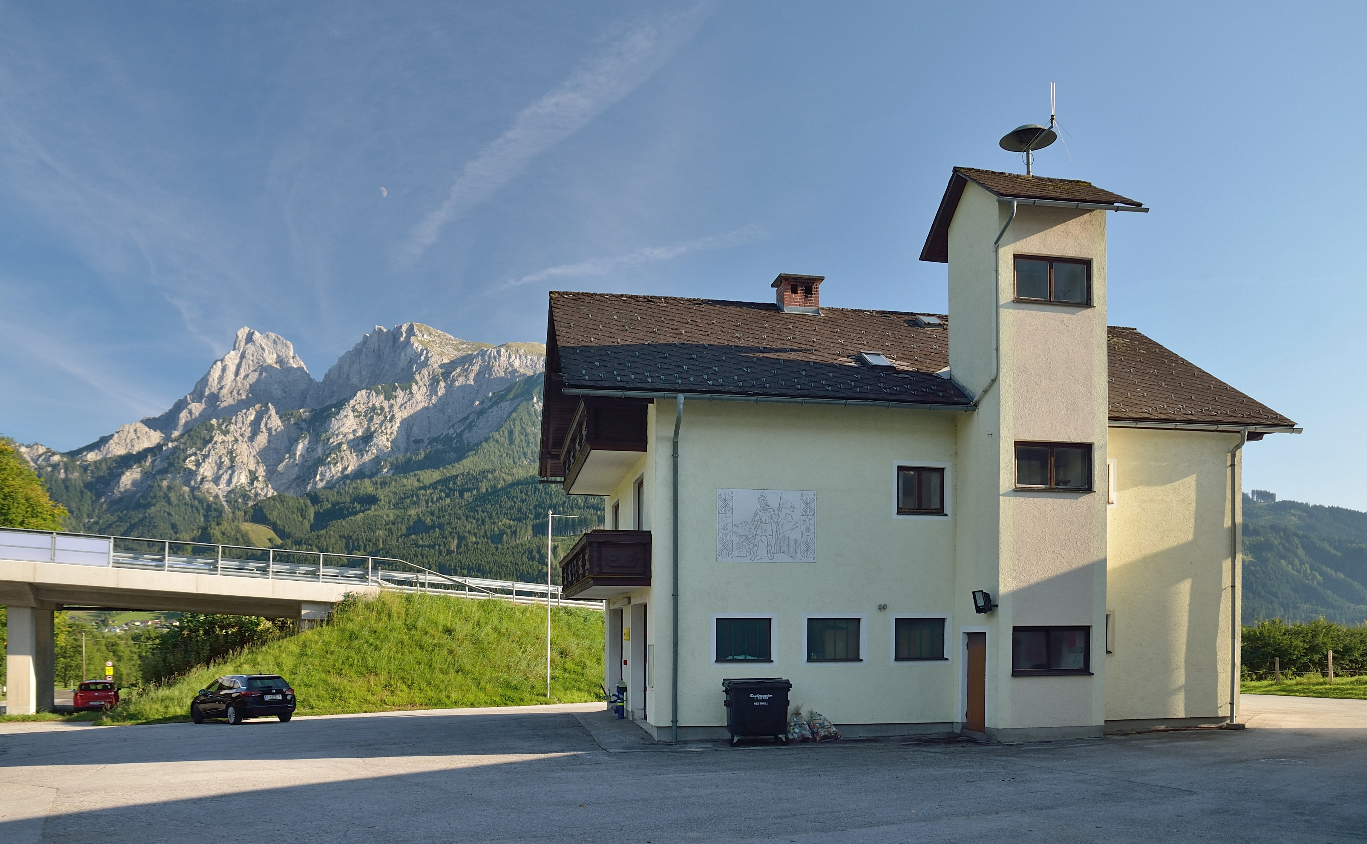 Das Feuerwehrhaus in Weng im Gesäuse. Im Hintergrund die Reichensteingruppe mit Admonter Reichenstein und Sparafeld.